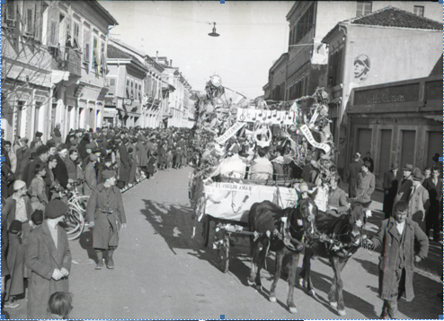 Shkoder 1932